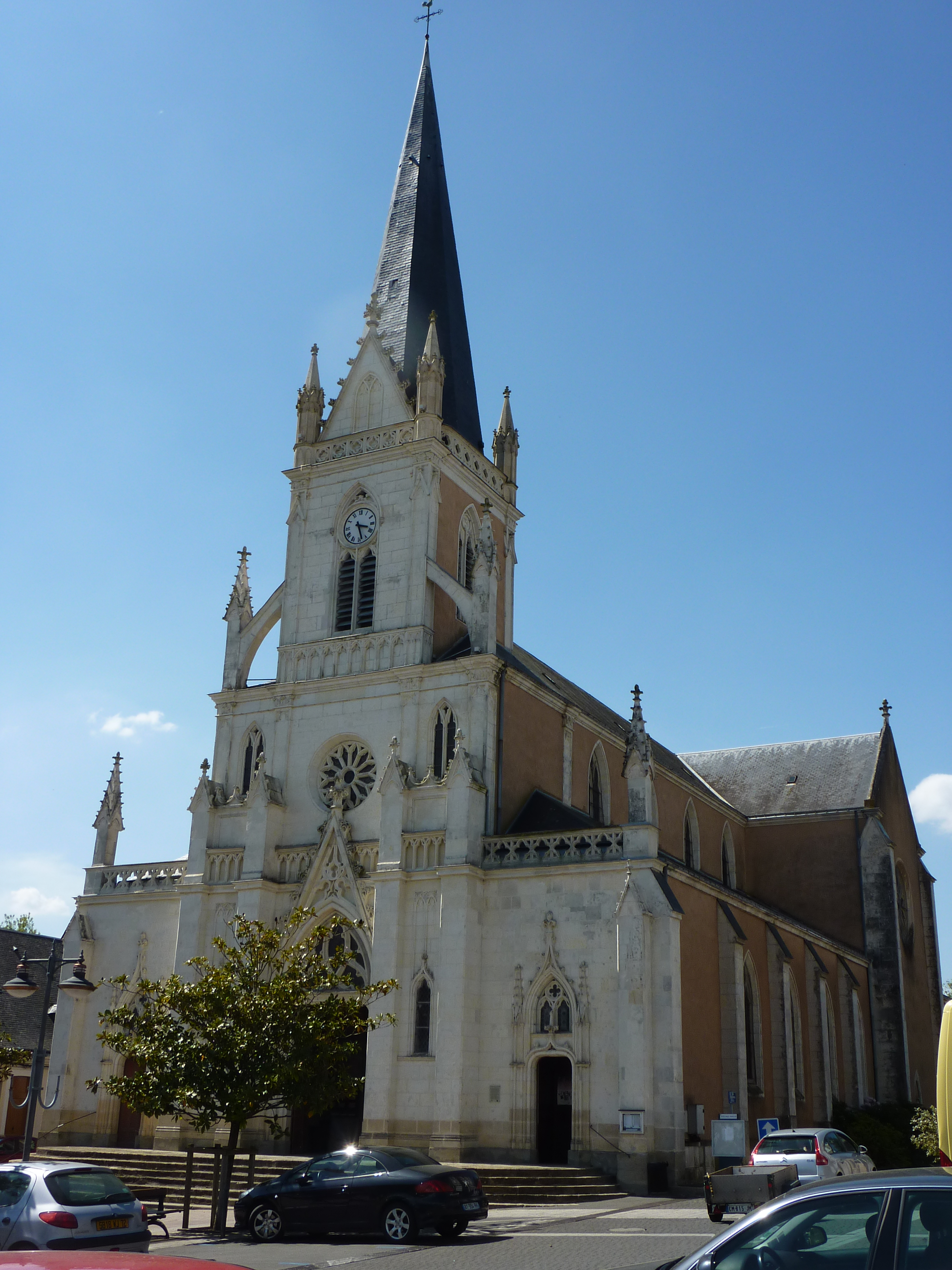 Eglise St Martin à Écommoy dans la Sarthe.